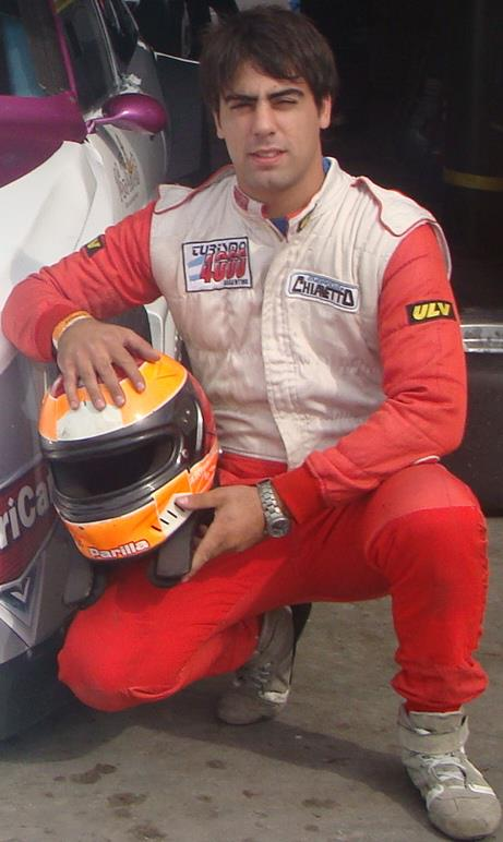 Hernan Rojas, piloto Turismo 4000 Argentino, antes de competir